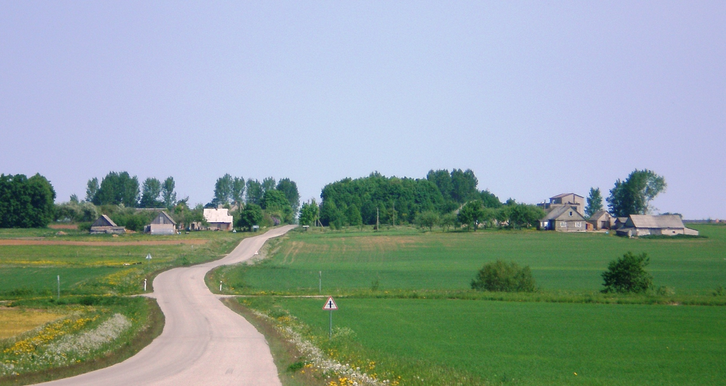 Pališkiai, Kėdainių raj.